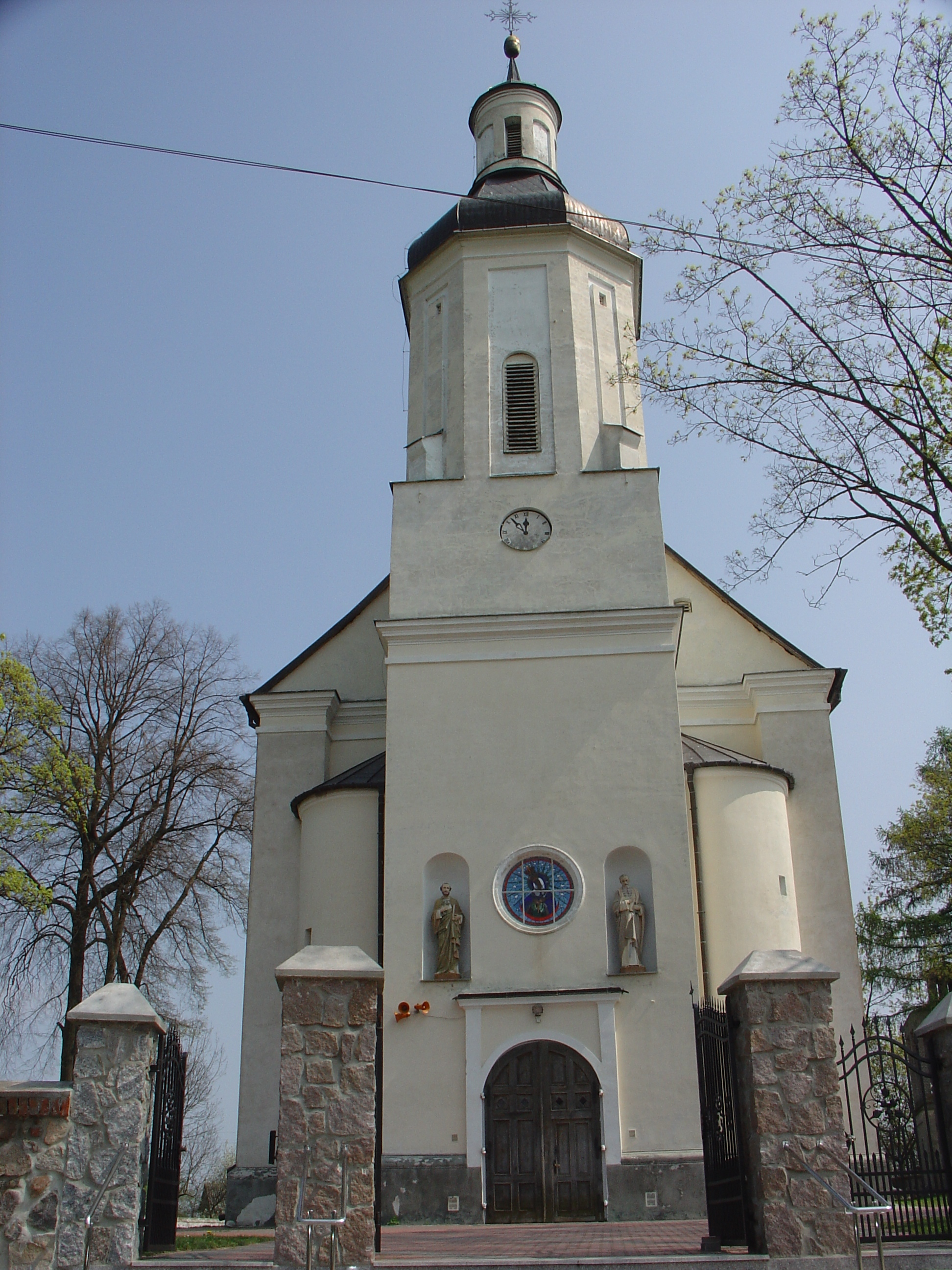 Kościół pw. św. Stanisława bpa w Knychówku, z 1668